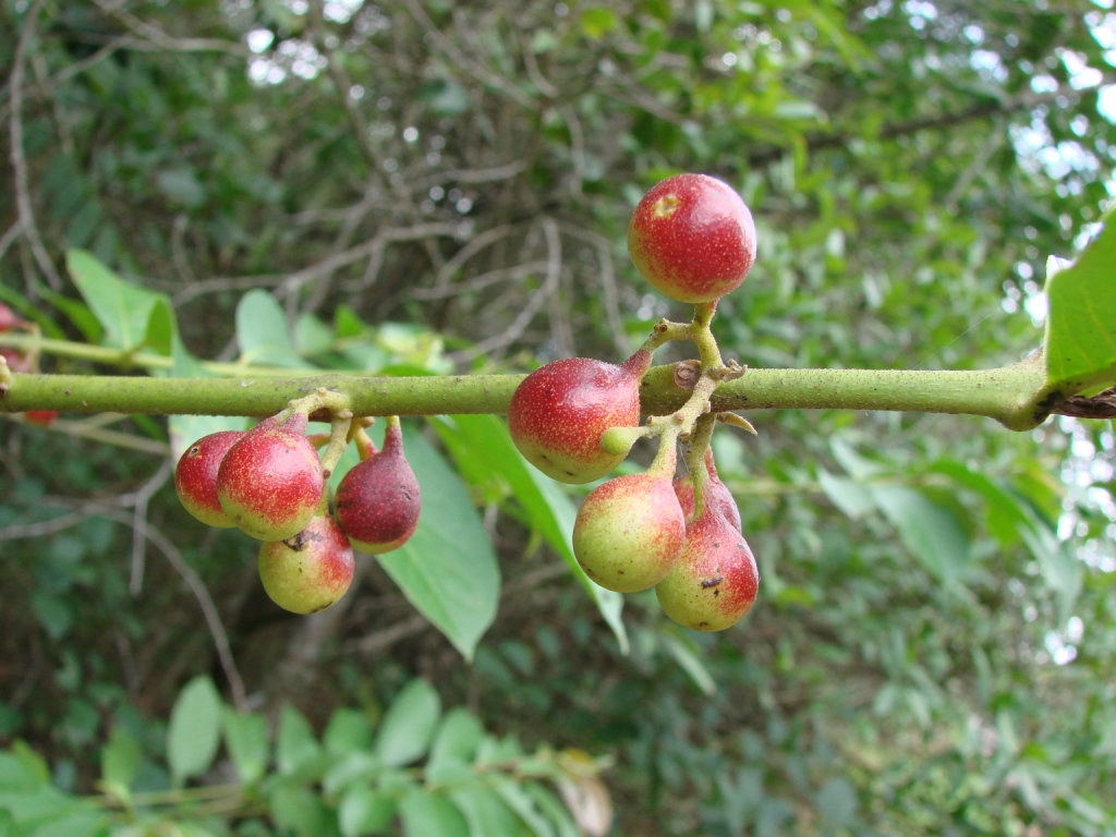 Siparuna guianensis - SIPARUNACEAE Parque Estadual Serras de Caldas Novas - Caldas Novas - Goiás - Brasil.